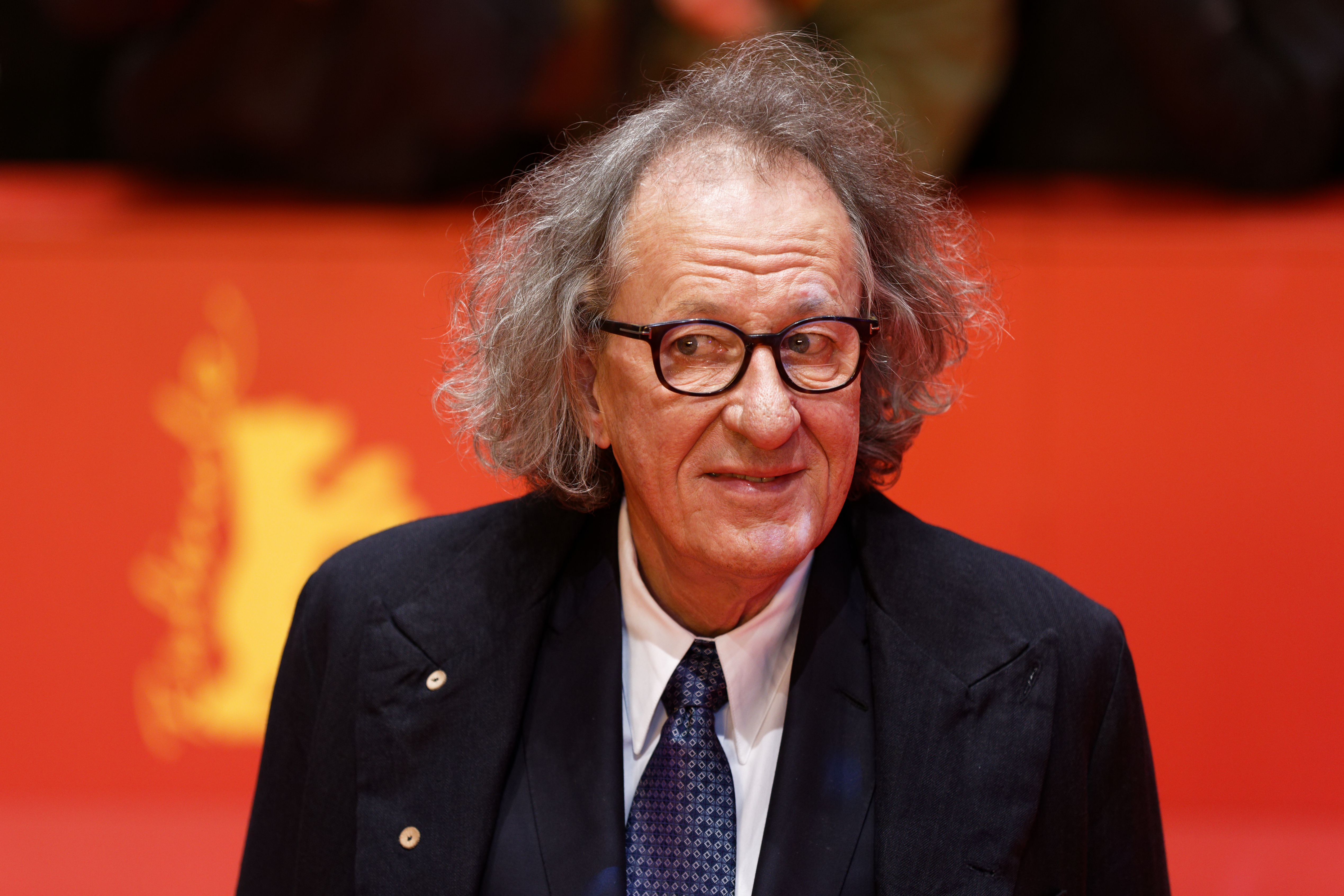 Geoffrey Rush bei der Premiere von Final Portrait bei der Berlinale 2017